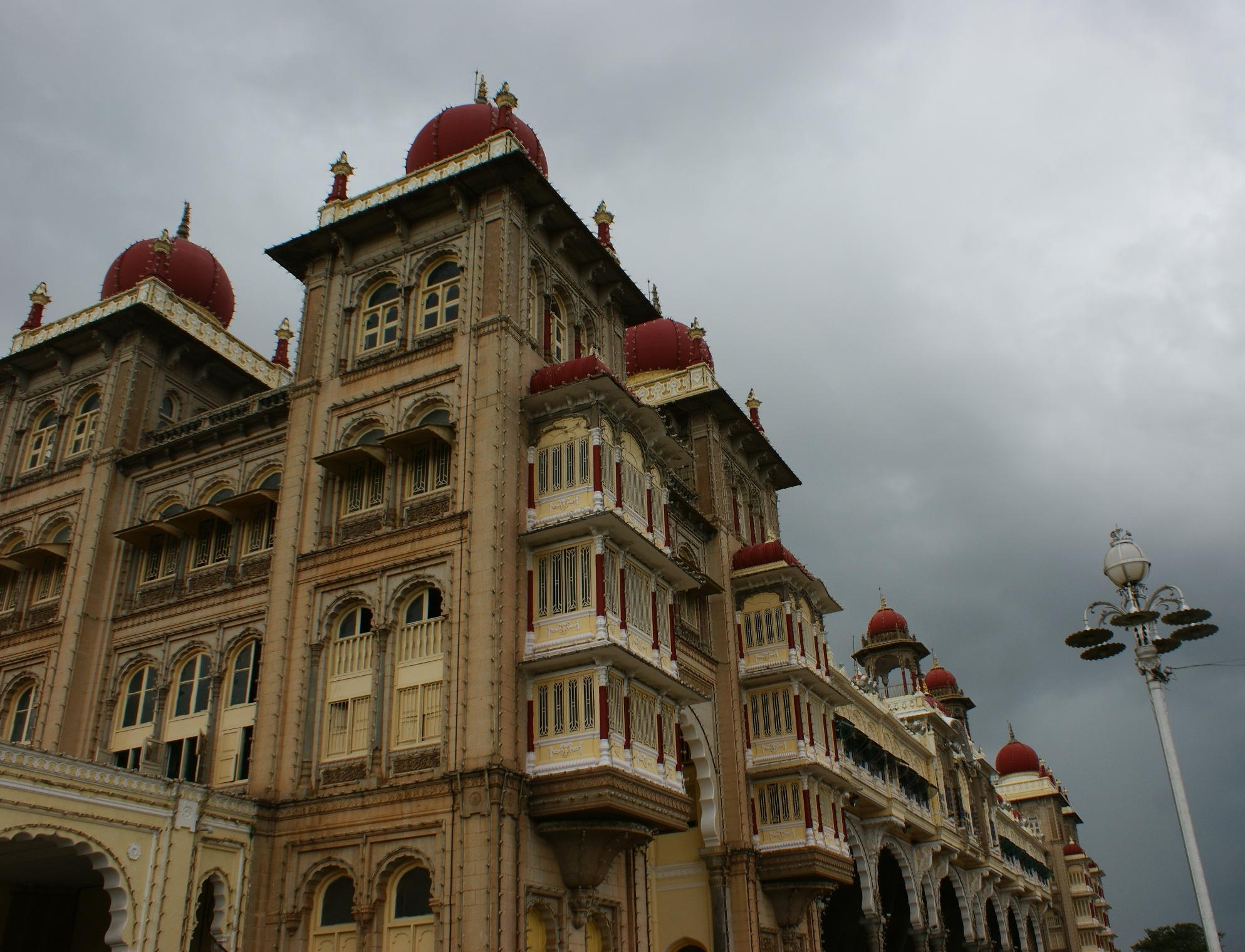 മൈസൂർ കൊട്ടാരം, അടുത്തുനിന്നെടുത്ത ചിത്രം.